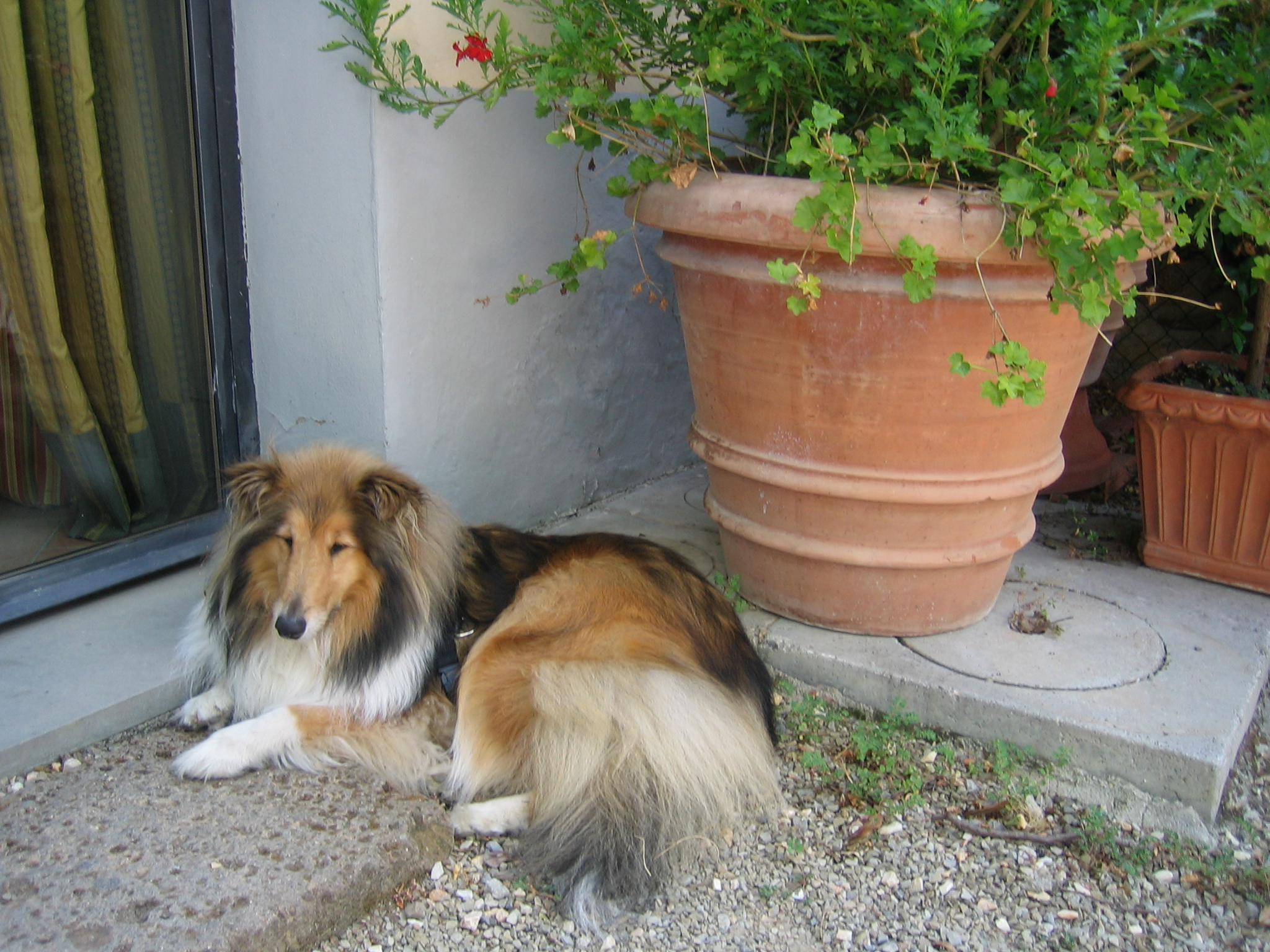 Collie (langhaar)